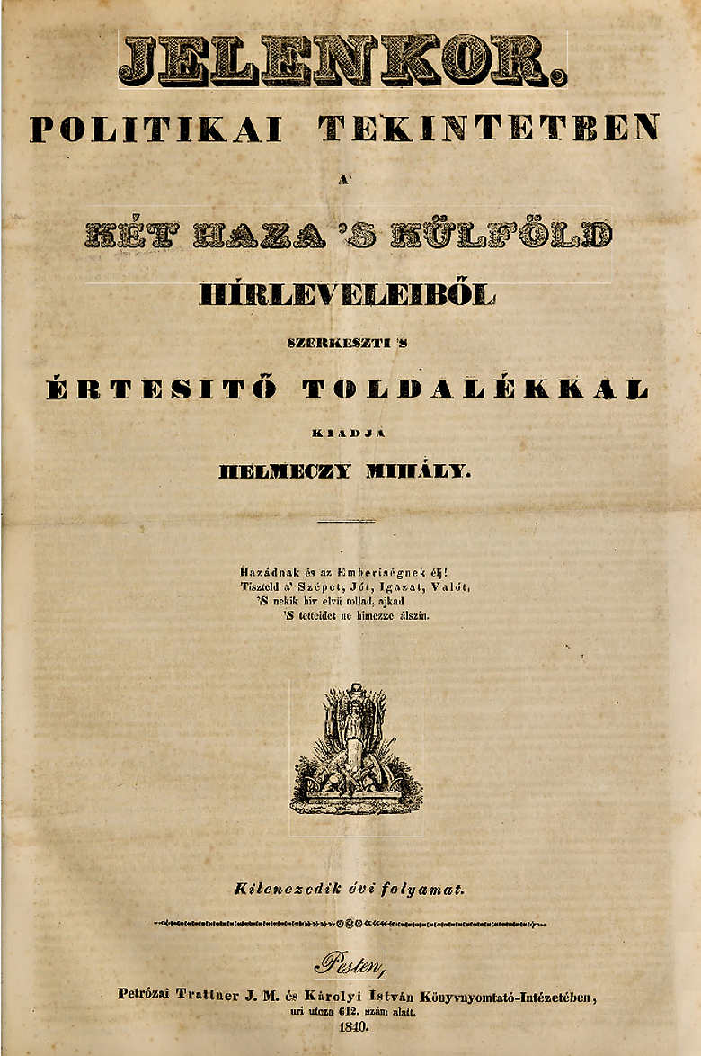 elenkor kilenczedik évi folyamat címlap A Jelenkor 1832-től 1848-ig Pesten kiadott politikai lap volt. Néhány nappal a halála előtt, Kisfaludy Károly engedélyt nyert egy politikai lap kiadására. Az engedélyt Helmeczy Mihályra ruházta át, aki a lapot 1832. január 1-jén megindította. A Jelenkor hetenként kétszer, szerdán és szombaton jelent meg Pesten 4-rét félíven a Társalkodó című melléklappal együtt, amely szintén kétszer jelent meg hetenként. Mint segédszerkesztő, Csató Pál működött a lapnál 1833 végéig, és ő írta a vezércikkeket; Nagy Ignác 1837-től 1841-ig a külföldi cikkeket fordította s a Budapesti naplót írta. 1837 elejétől Széchenyi István gróf indítványára a Jelenkor ívrétben jelent meg. 1837-ben nyomatott belőle 4080 példány és így a hazai lapok közt a legtöbb előfizetővel bírt. Politikai jelentőségre ugyan nem tehetett szert konzervatív iránya miatt, de a későbbi lapoknak az útját egyengette. 1843-tól Széchenyi István e lapot választotta orgánumául és tartotta mindvégig. Ekkor némi lendületet vett a lap, de határozott pártszínezetét ő sem vívhatta ki. Itt és a Társalkodóban jelentek meg a Duna-gőzhajózást a Fekete-tengerrel való összeköttetés és egyéb nemzetgazdászati cikkei. 1847-től Jókai írta Budapesti naplóját. Királyi Pál 1845-től 1848-ig a lapnál dolgozott, előbb mint a külföldi rovat vezetője, majd 1848. április 18-tól átvette az akkor már hanyatló lap szerkesztői tisztét, egészen annak megszűnéséig, 1848. június 29-ig.